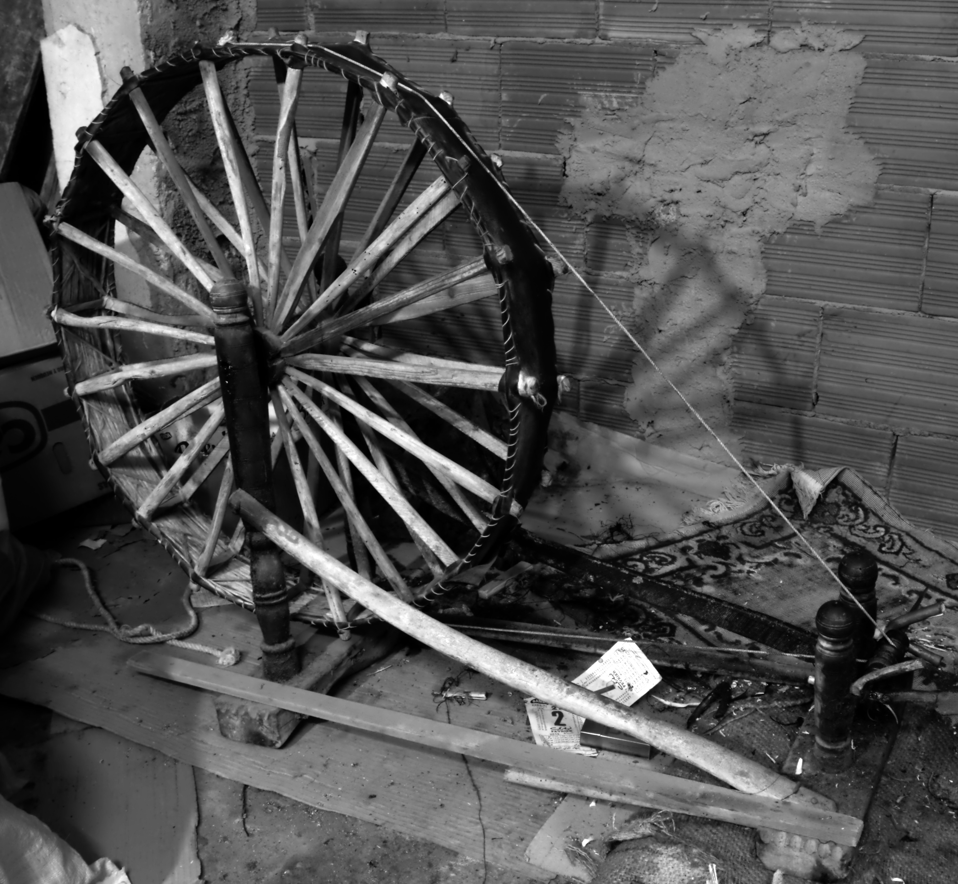 Reddena, un outil dans une boutique de tissage à Sayada, Tunisie